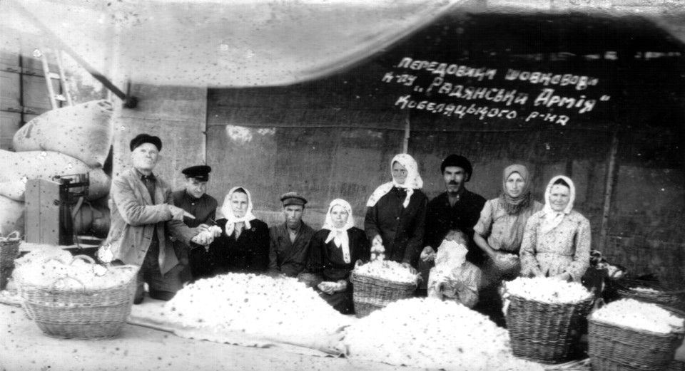 Кращі шовководи колгоспу